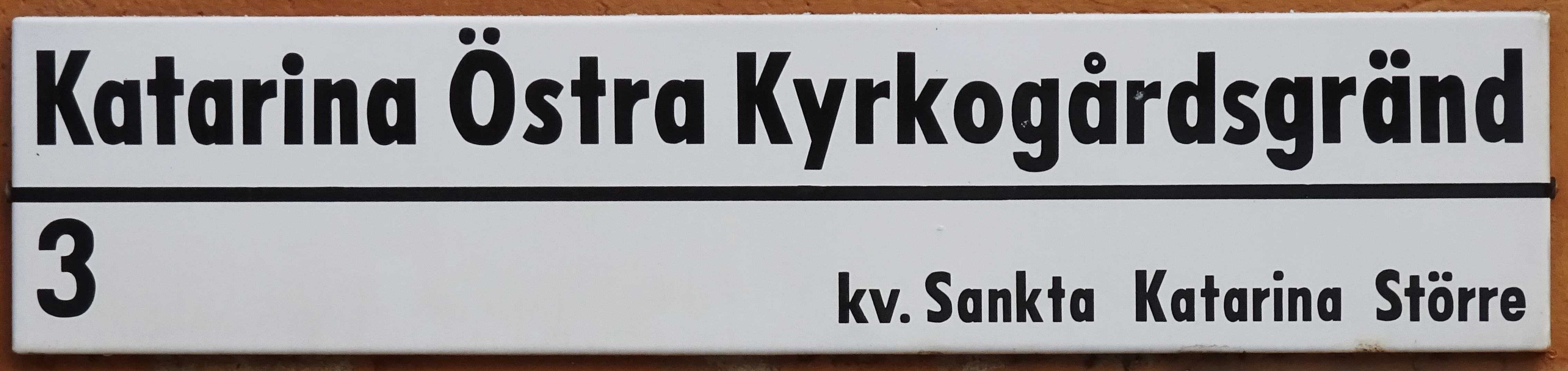 Katarina Östra Kyrkogårdsgränd gatuskylt